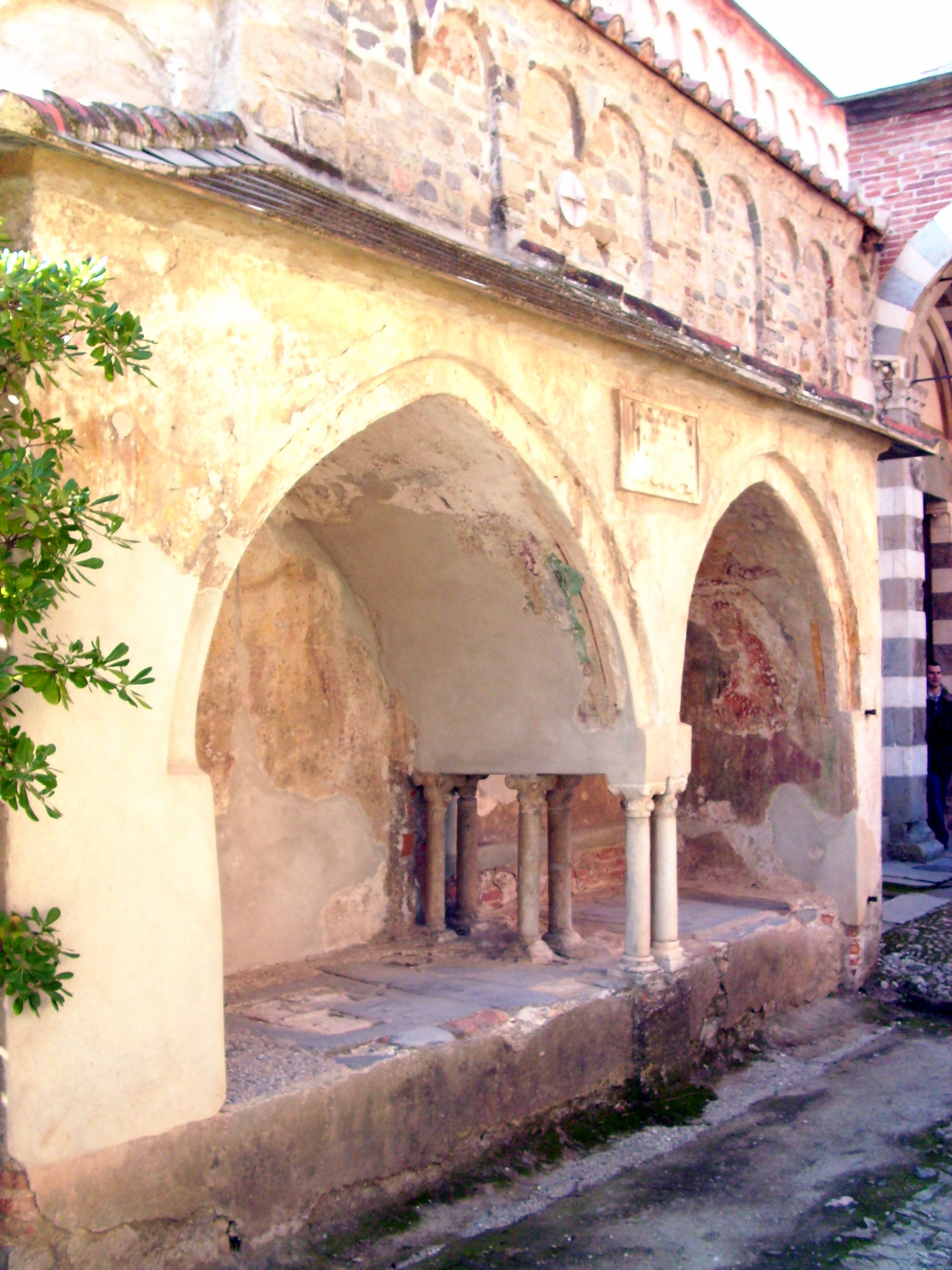 Cattedrale di San Paragorio di Noli, Liguria, Italy